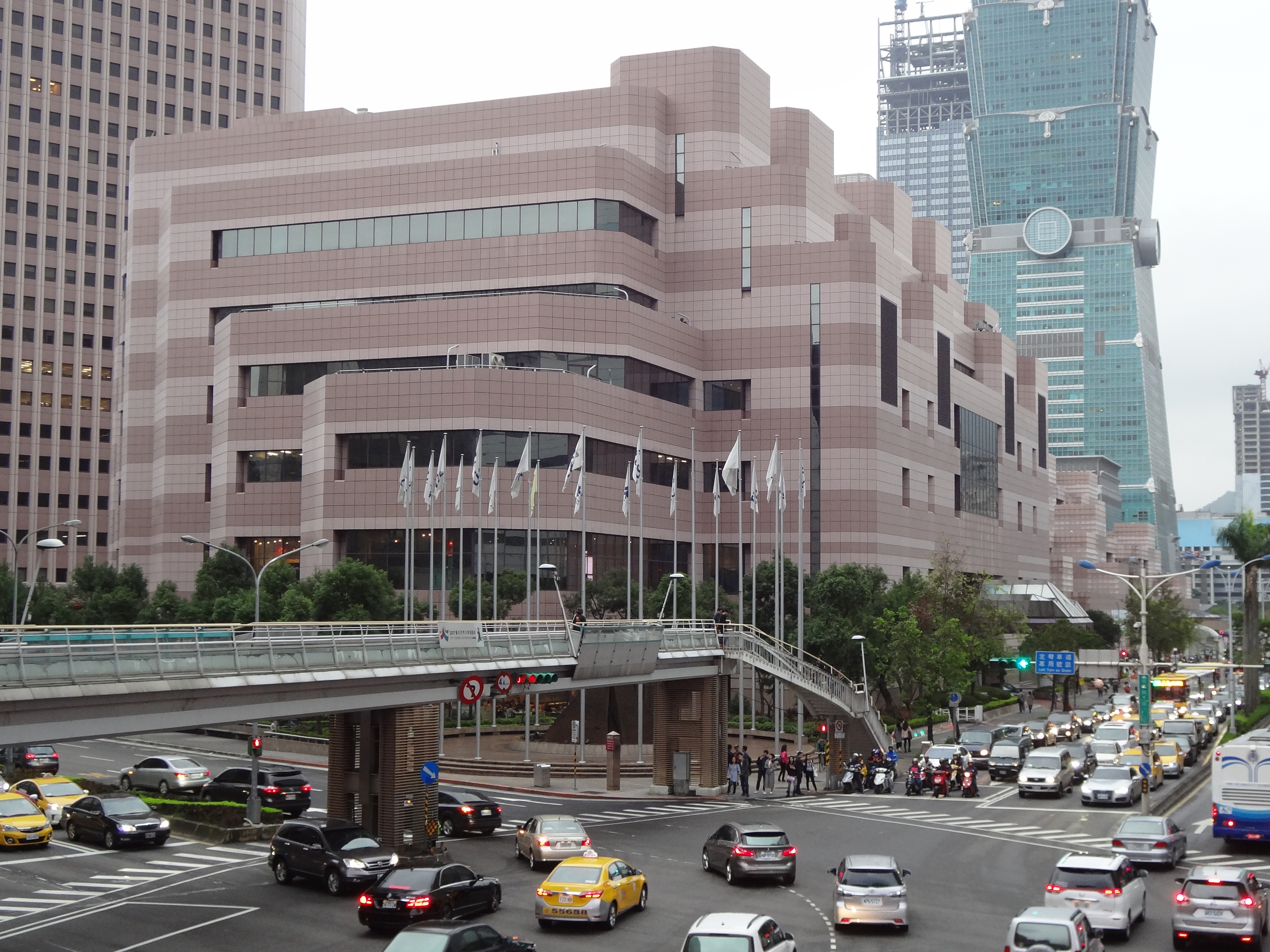 台北國際會議中心，位於臺北市信義區信義路五段1號。